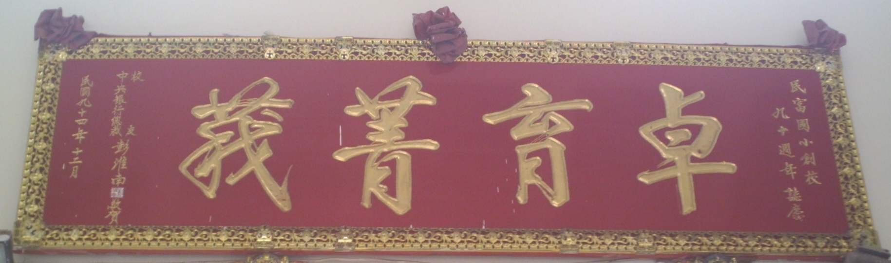 中文（台灣）: 新竹市北區民富國民小學校友、中華民國中央銀行總裁彭淮南於母校九十週年校慶時贈匾。